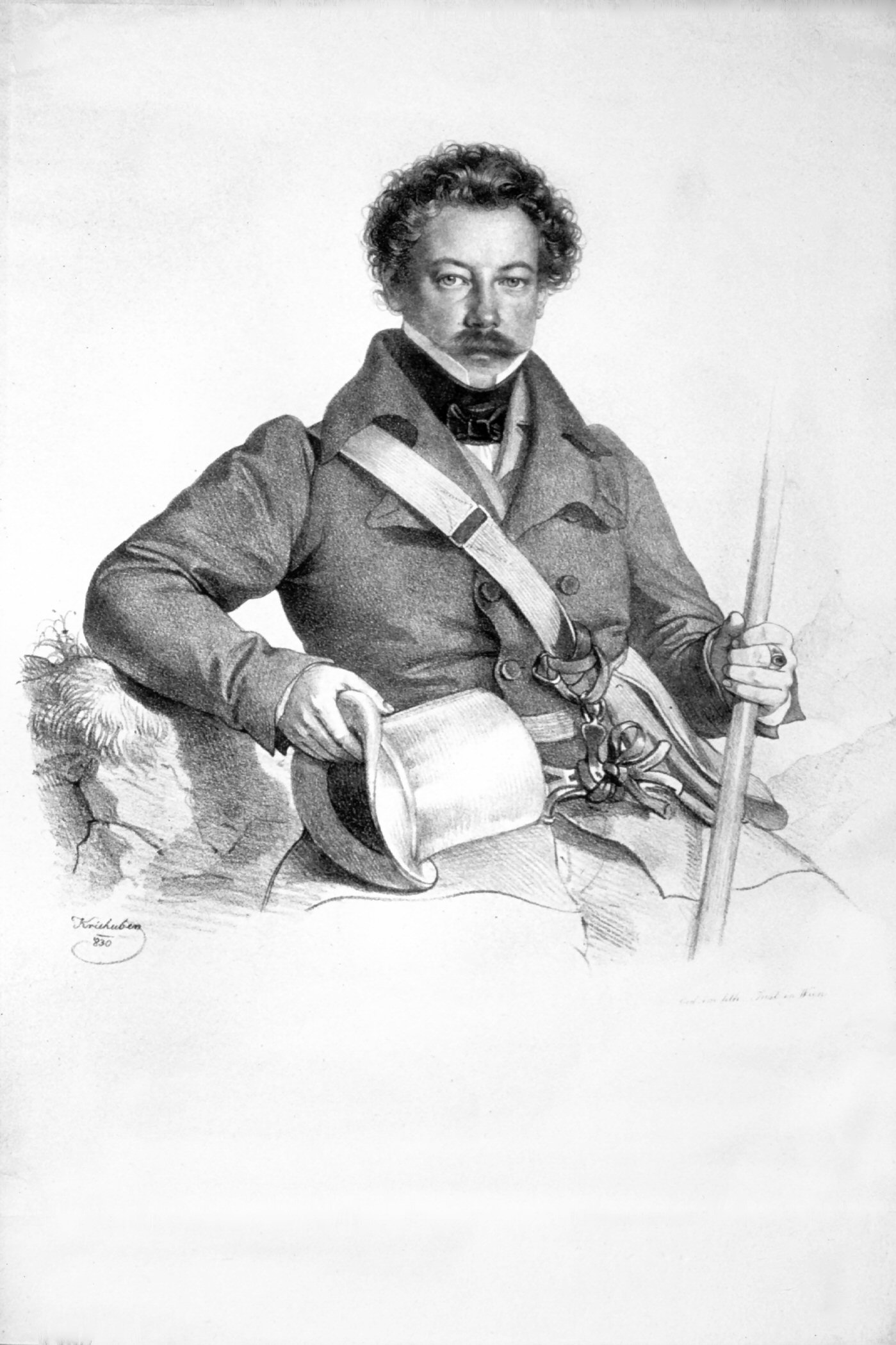 Franz Freiherr von Rosthorn (1796-1877), österreichischer Geolöoge und Industrieller.